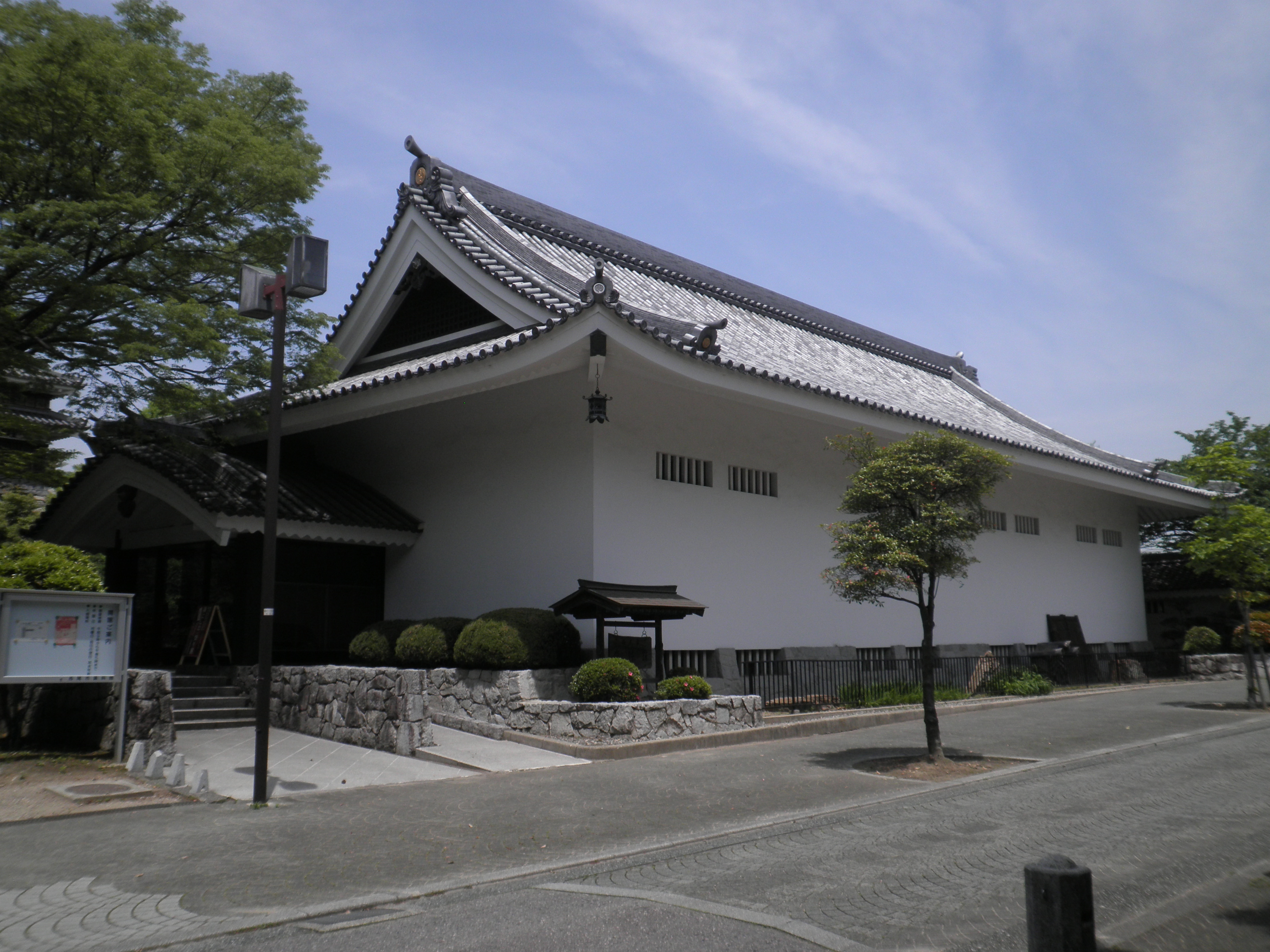 愛知県西尾市の西尾市歴史公園内にある西尾市資料館